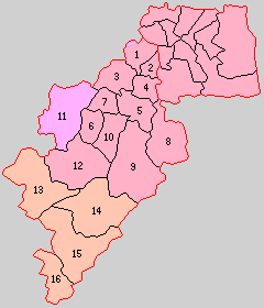 島根県飯石郡の町村制時点の町村。